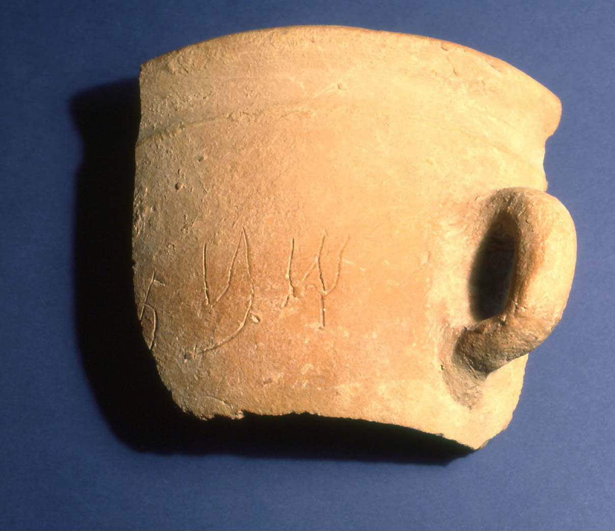 חורבת עוצה - שבר של כן לנר שבת שעליו חרותה המילה שבת. נמצא בשכבה 8 צילם הווארד סמיטליין